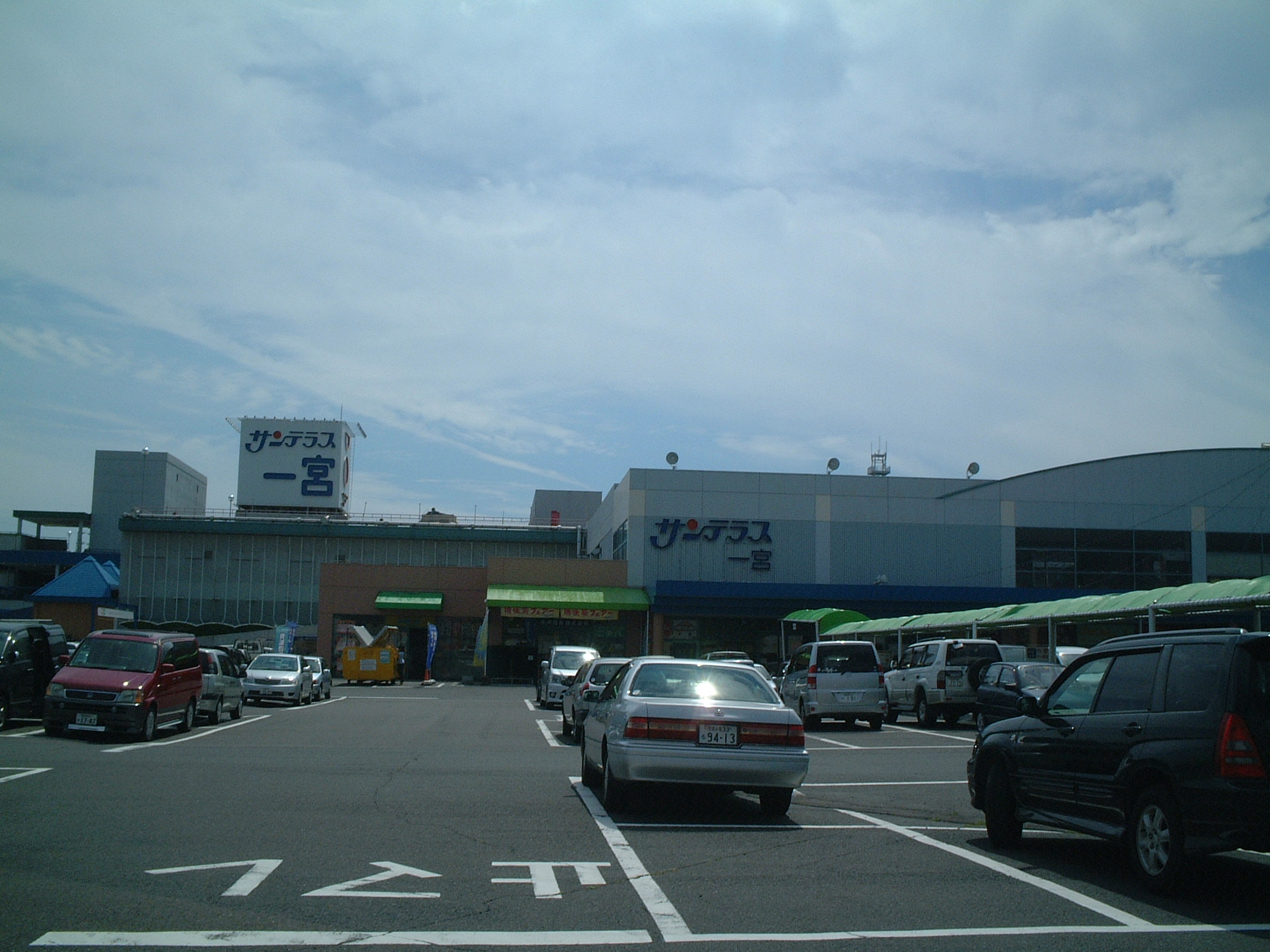 ユニー一宮店の画像